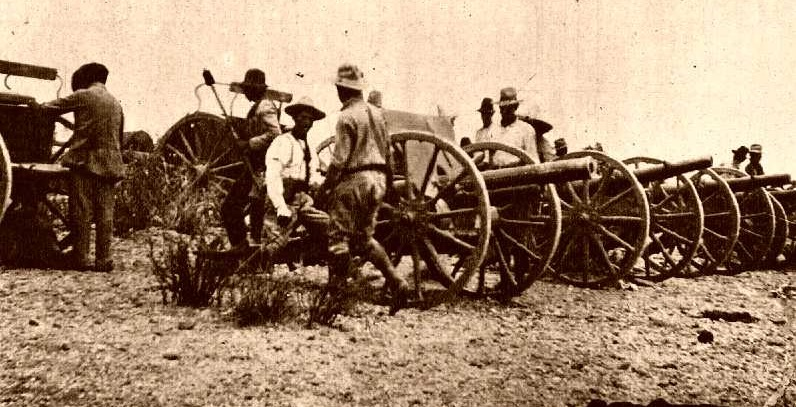 Villista tüzérség Torreónnál 1914-ben